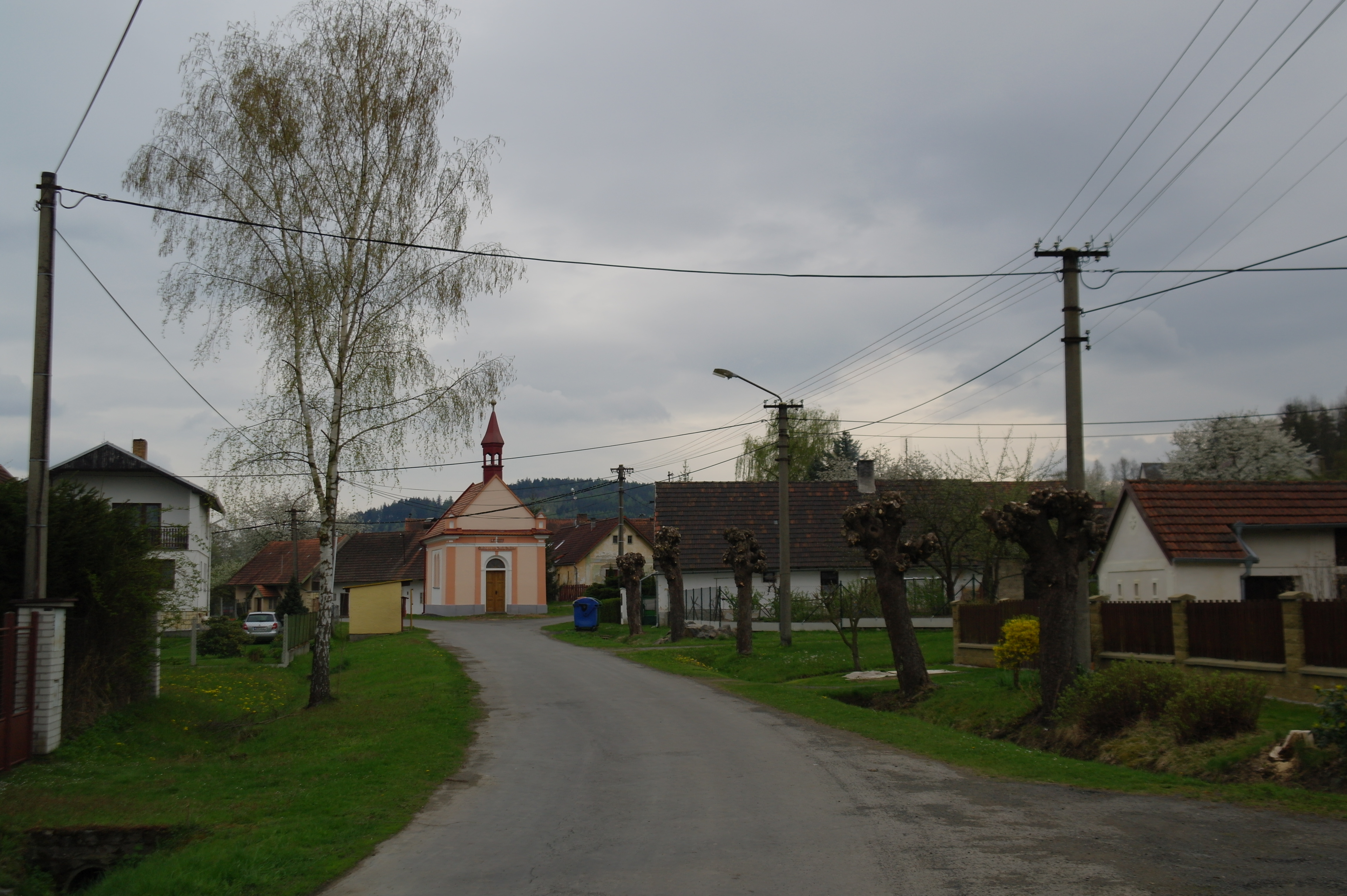 Třebýcina